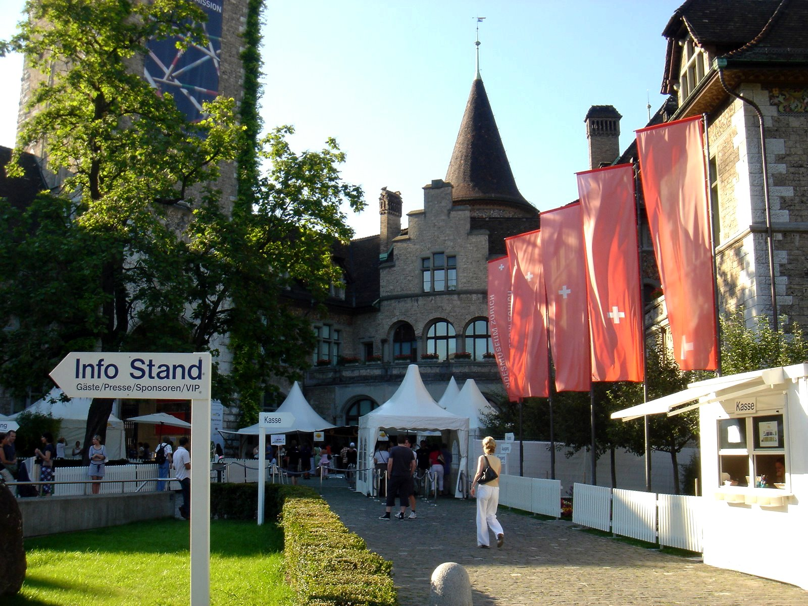 Swiss National Museum in Zurich